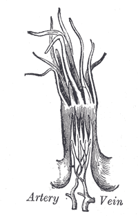 A filiform papilla. Magnified